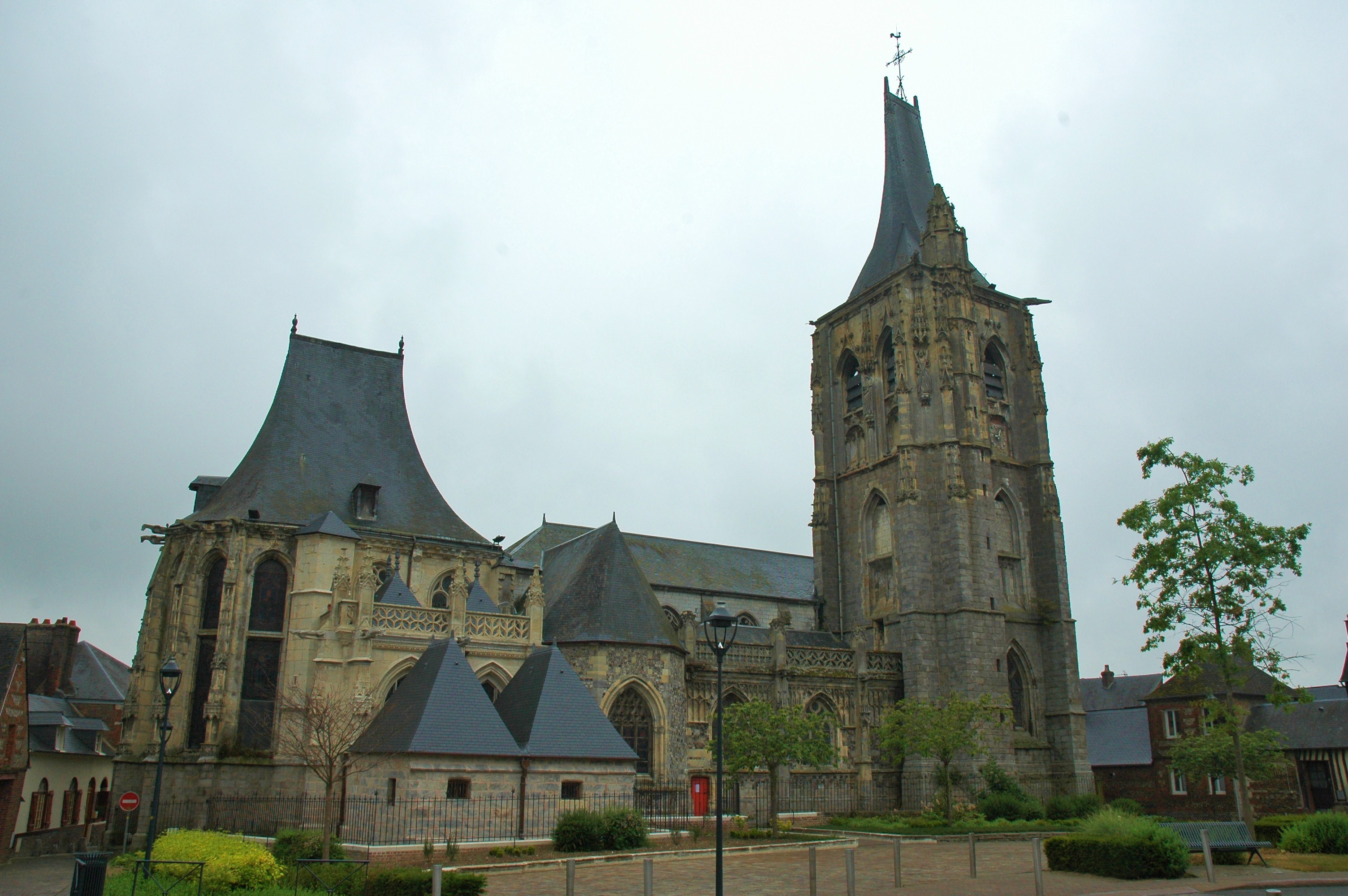 Eglise Notre Dame,XVI siecle